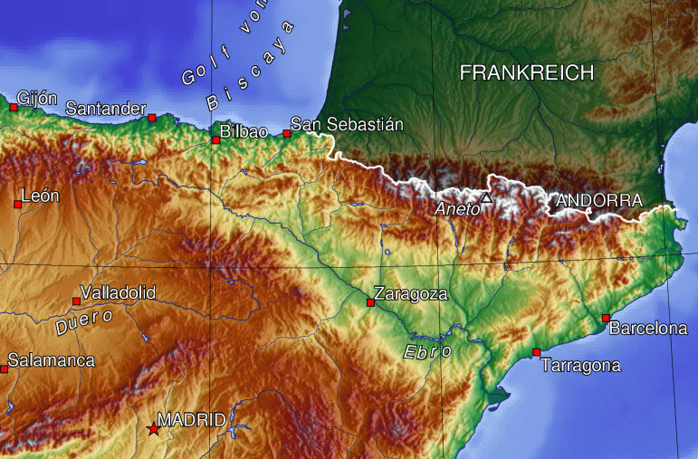 Ausschnitt der Grafik Spanien_topo.jpg / Map of North East Spain with the valley of the river Ebro (German Labels) Bei der Erstellung der Landkarte wurden die Generic Mapping Tools verwendet: Für das Relief - falls vorhanden - wurde(n) einer oder mehrere dieser externen Public Domain-Datensätze verwendet: ETOPO2 (Auflösung 2′ = 3,6km am Äquator) GLOBE (30″ = 0,9km) SRTM (Shuttle Radar Topography Mission) (3″ = 90m)